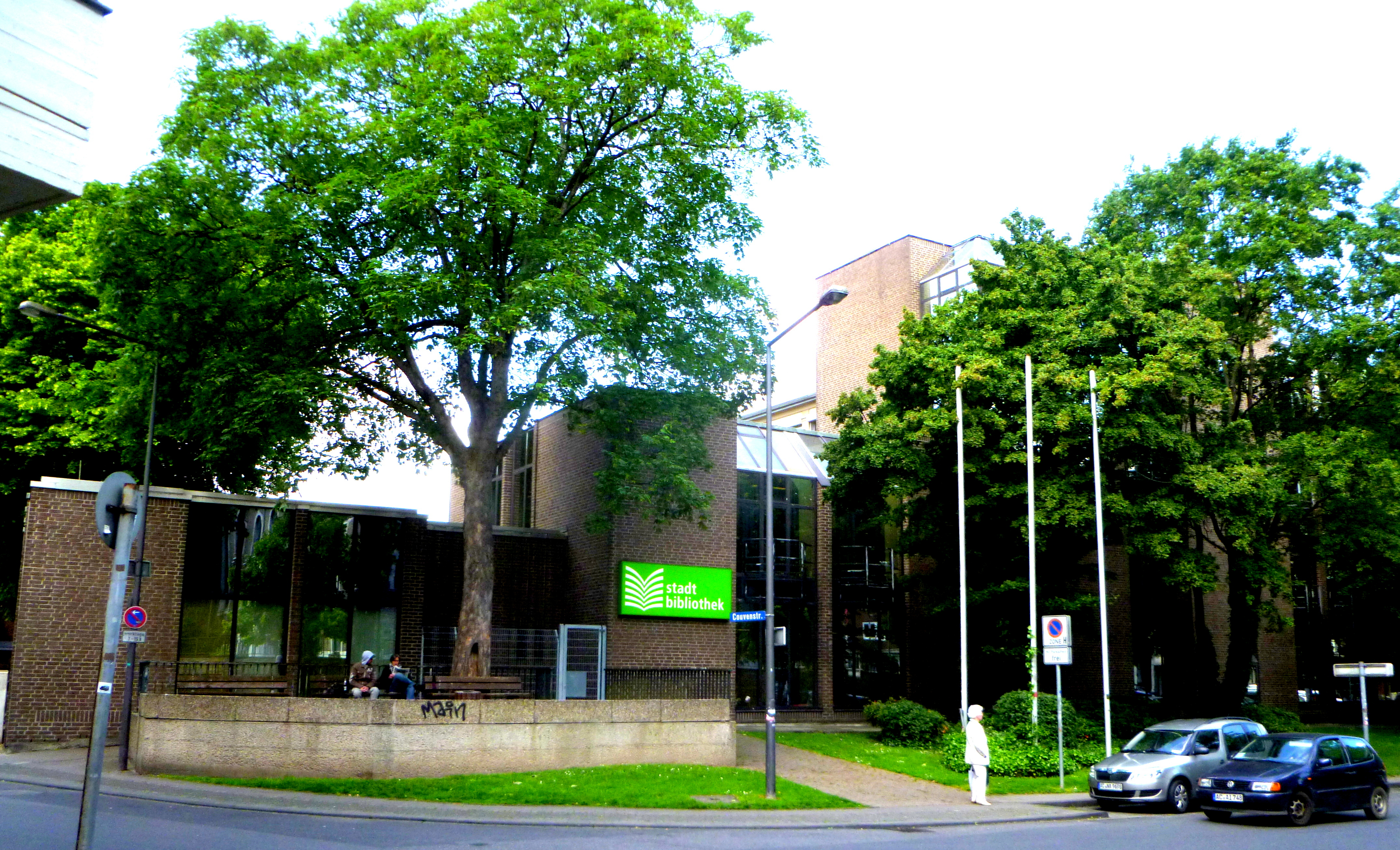 Stadtbibliothek Aachen - Haupttrakt